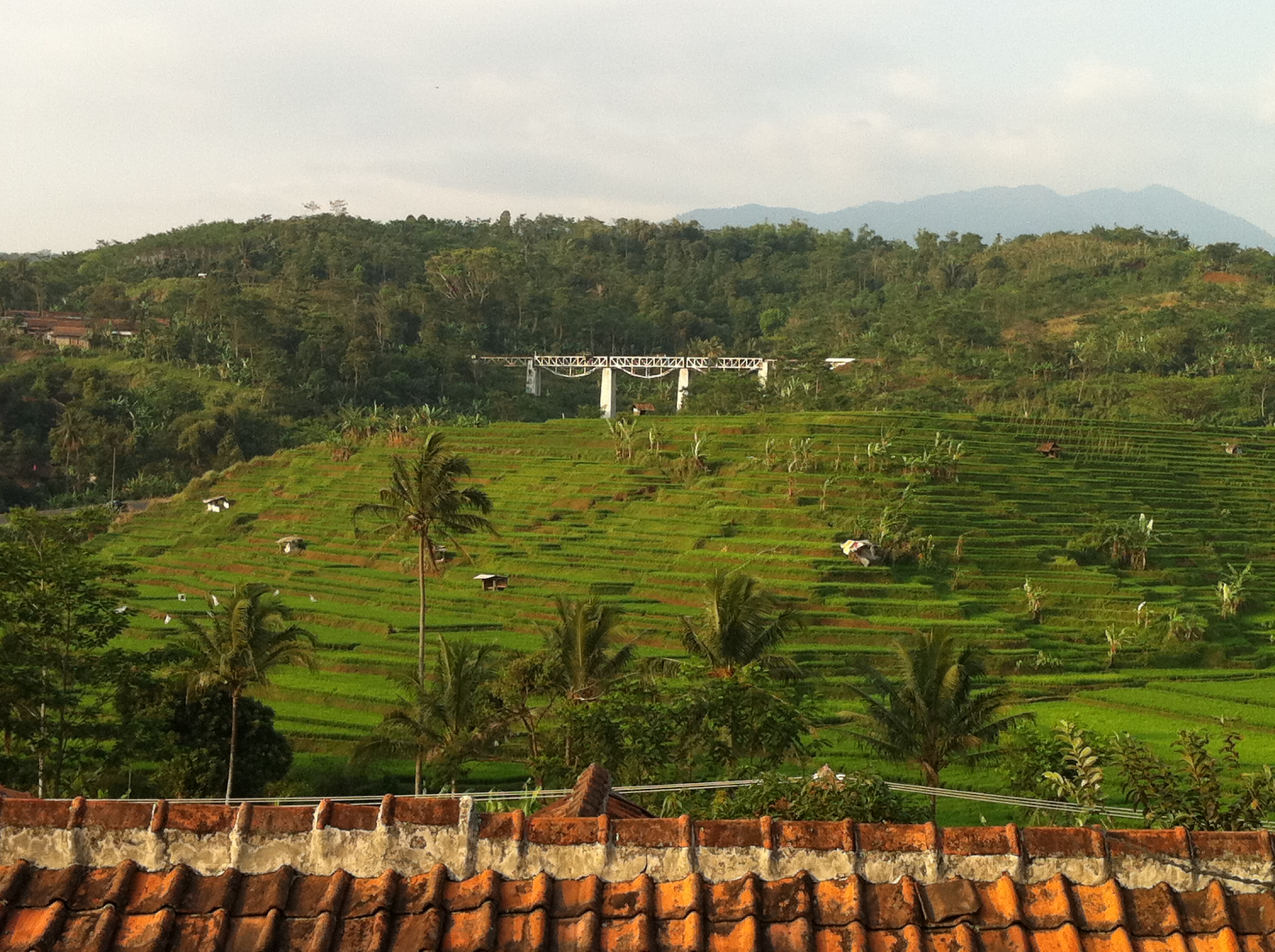 Ciburuy, Padalarang, West Bandung Regency, West Java, Indonesia